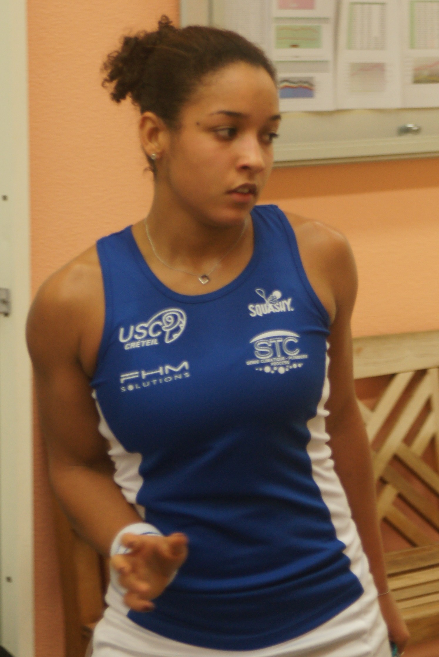 Mélissa Alvès, Monte-Carlo Squash Classic 2018